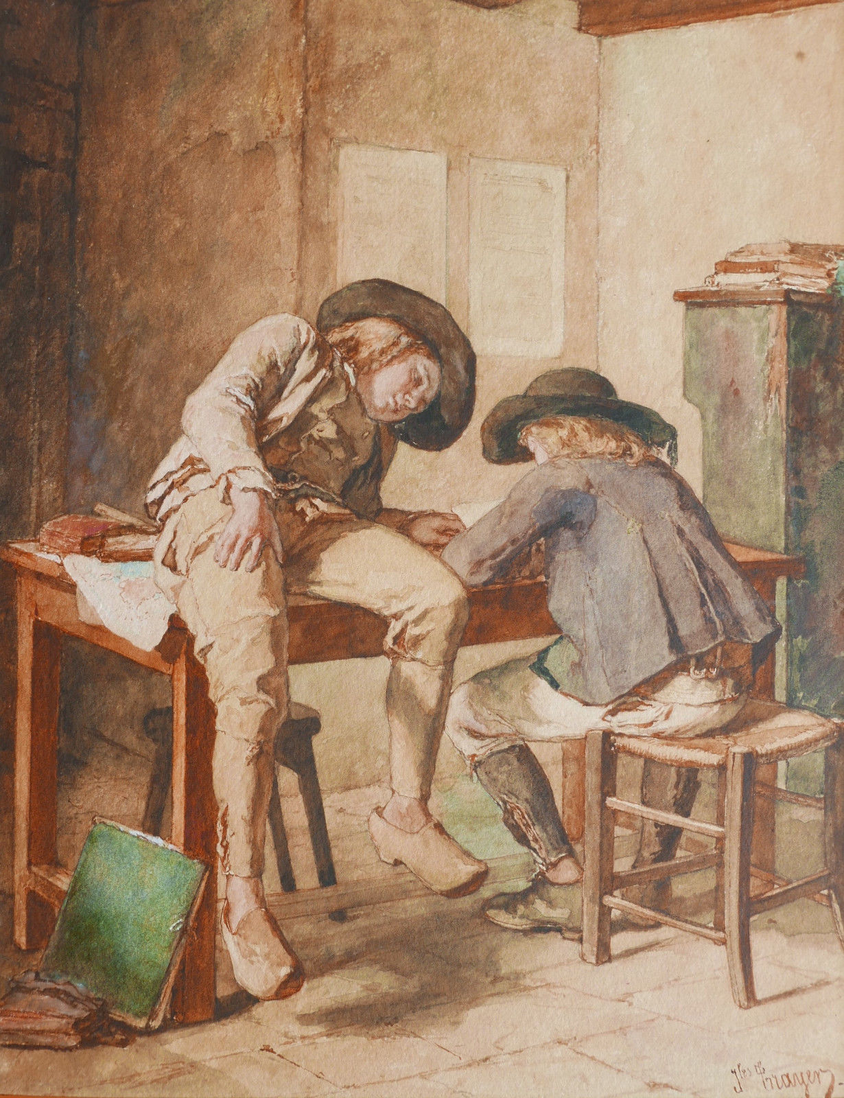 Un jeune garçon est assis sur la table où un autre fait ses devoirs. Habits traditionnels bretons.